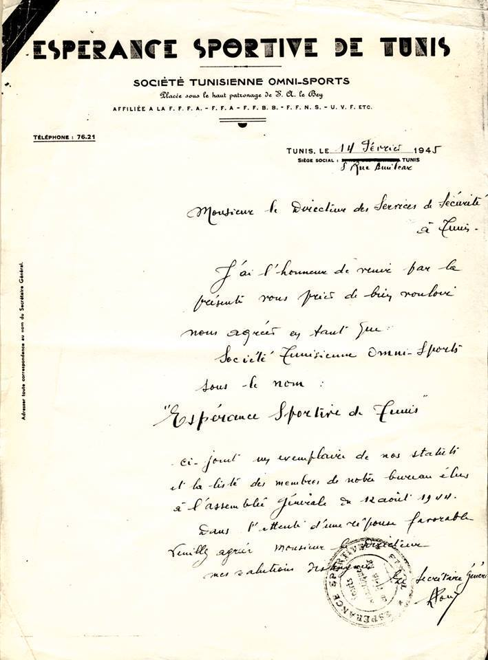 Bab souika, Tunis, Tunisie